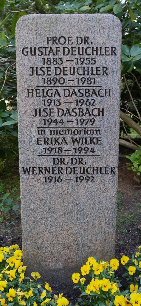 Grab des Juristen Werner Deuchler (1916-1992) auf dem Friedhof Ohlsdorf in Hamburg